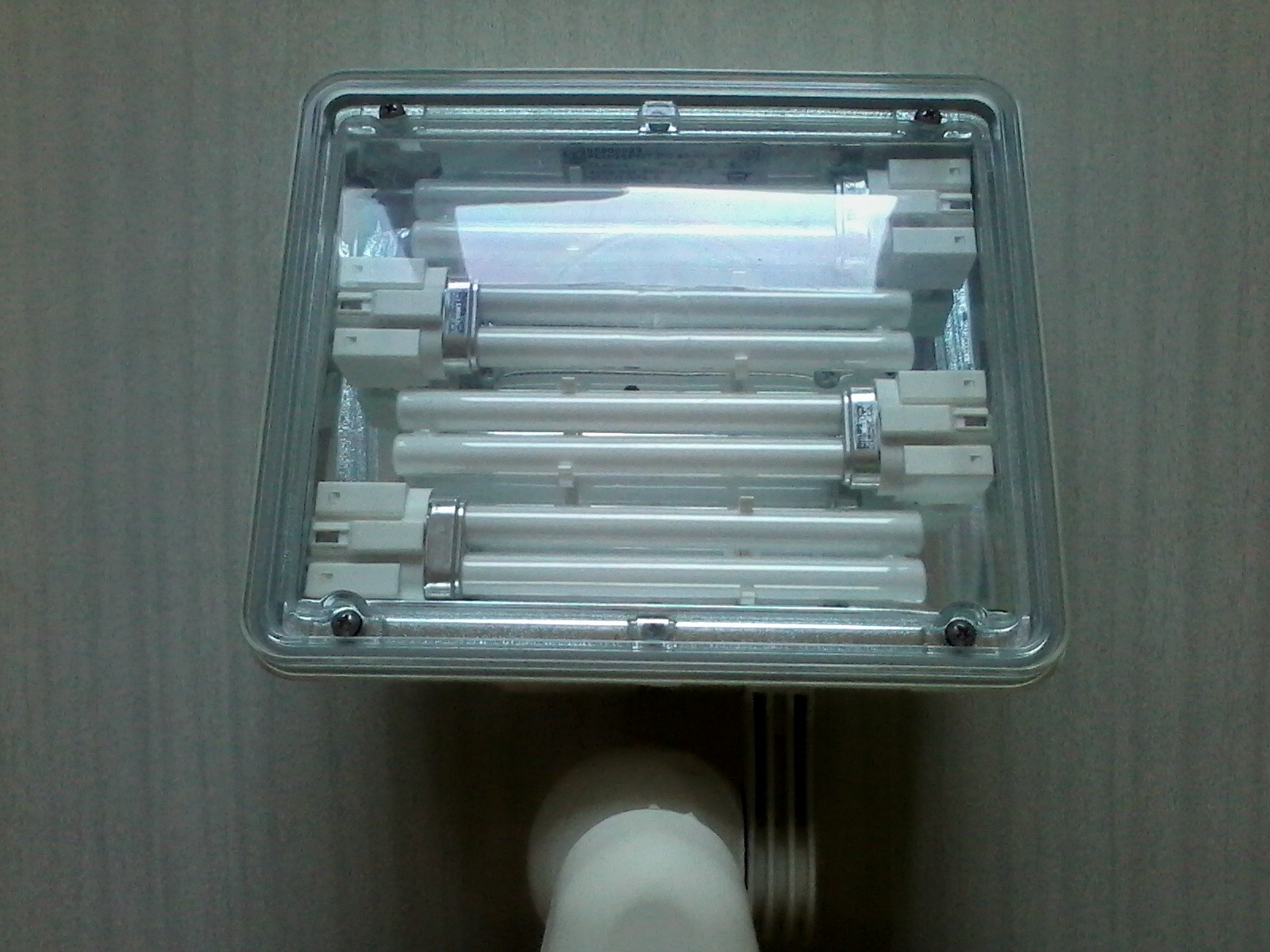 Знято мобілкою Самсунг